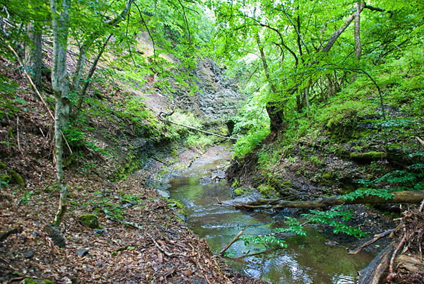 Река Мавля, Крым.